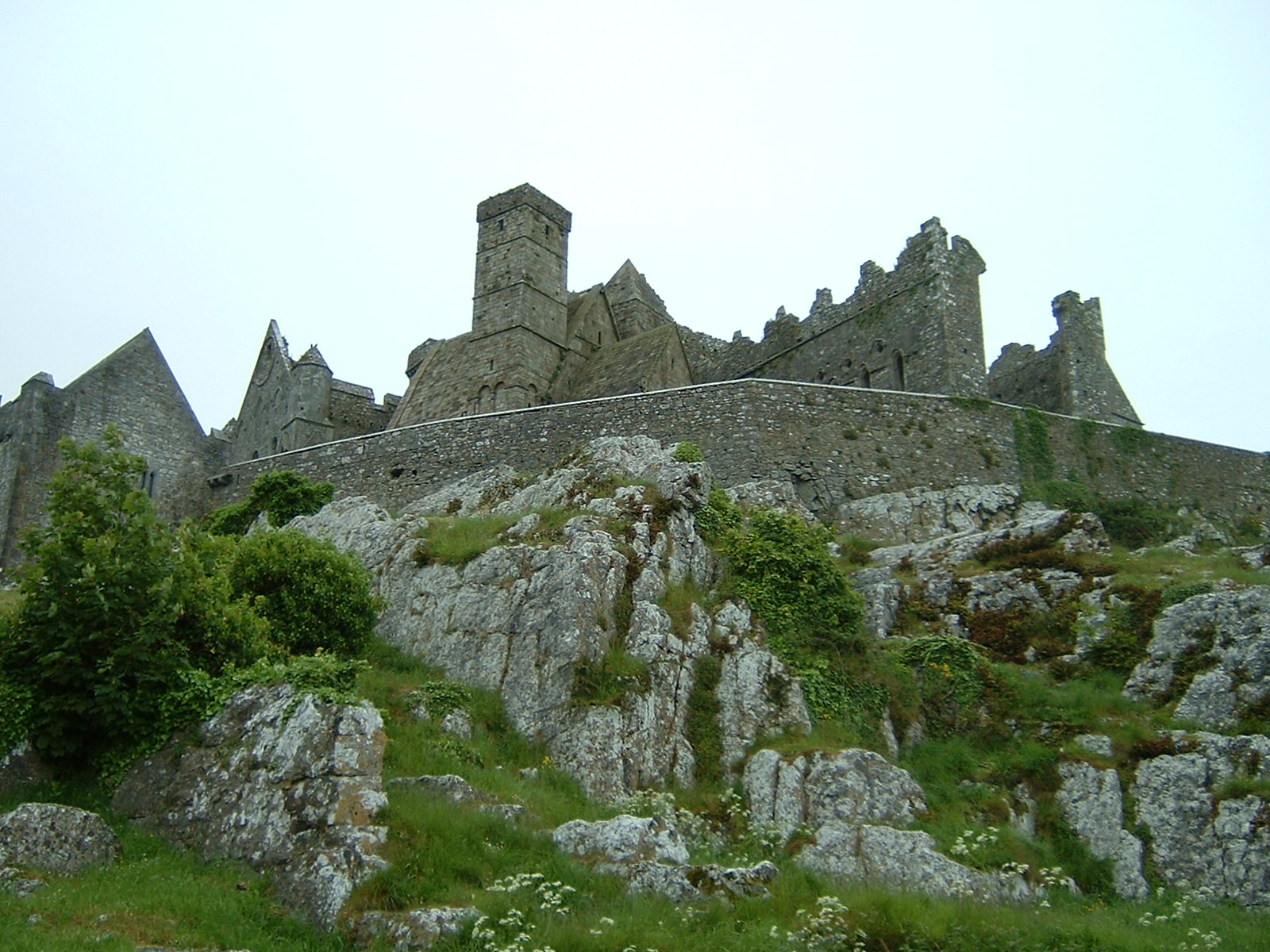 Bildbeschreibung: Cashel Quelle: selbst gemacht Fotograf/Zeichner: Harald Köster, Bochum, Germany Datum: May 2005